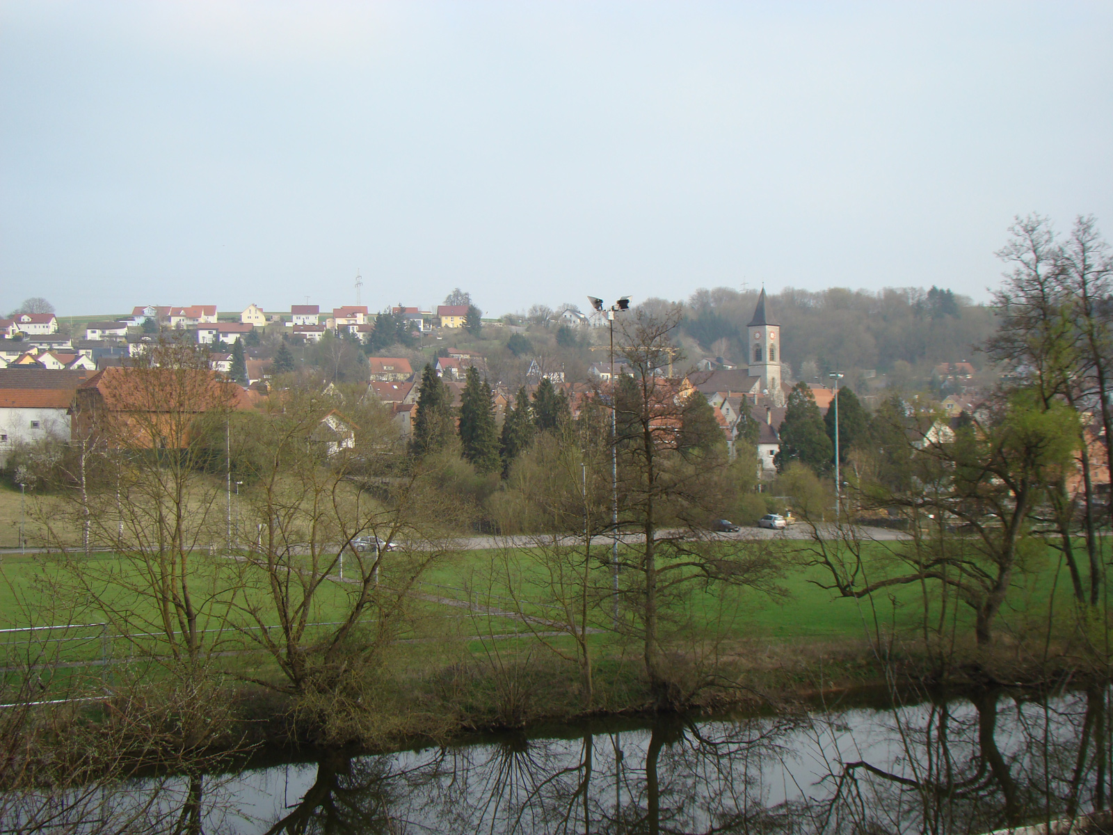 Züttlingen